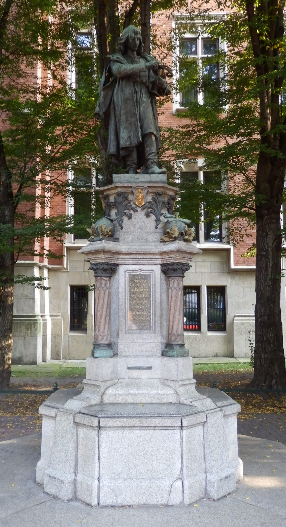 Nicolaas Copernicus (19 februari 1473 – 24 mei 1543) was een wiskundige en astronoom die een heliocentrisch model van het universum formuleerde waarbij de zon, in plaats van de aarde, in het centrum werd geplaatst. Deze foto van zijn standbeeld werd genomen te Krakow in Polen in september 2014.